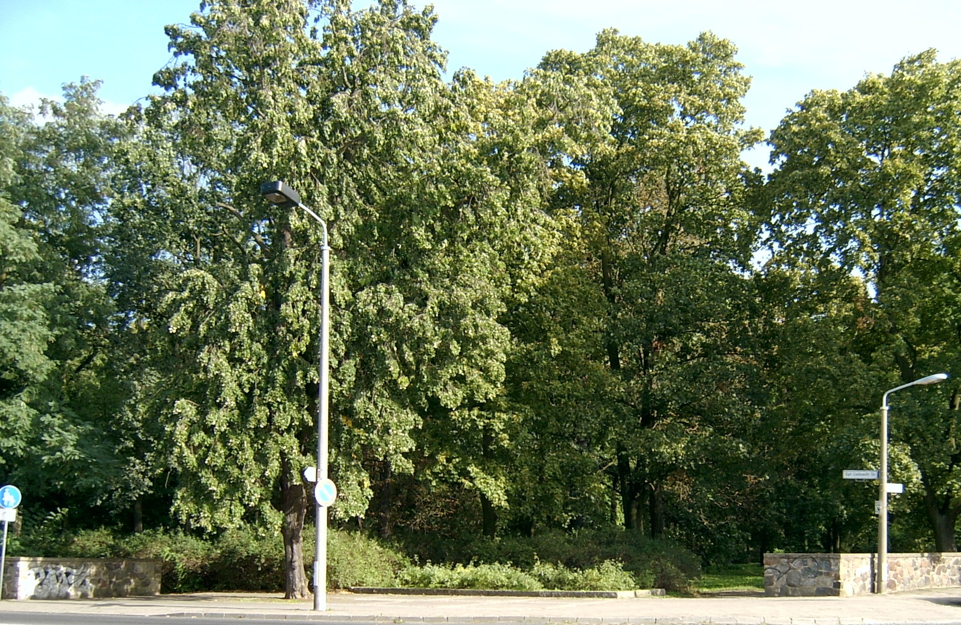 Eingang zum Kleistpark in Frankfurt (Oder) Ecke Karl-Liebknecht-Straße/Humboldt-Straße Object location 52° 20′ 41.00″ N, 14° 32′ 18.00″ E - OpenStreetMap - Proximityrama (Info)